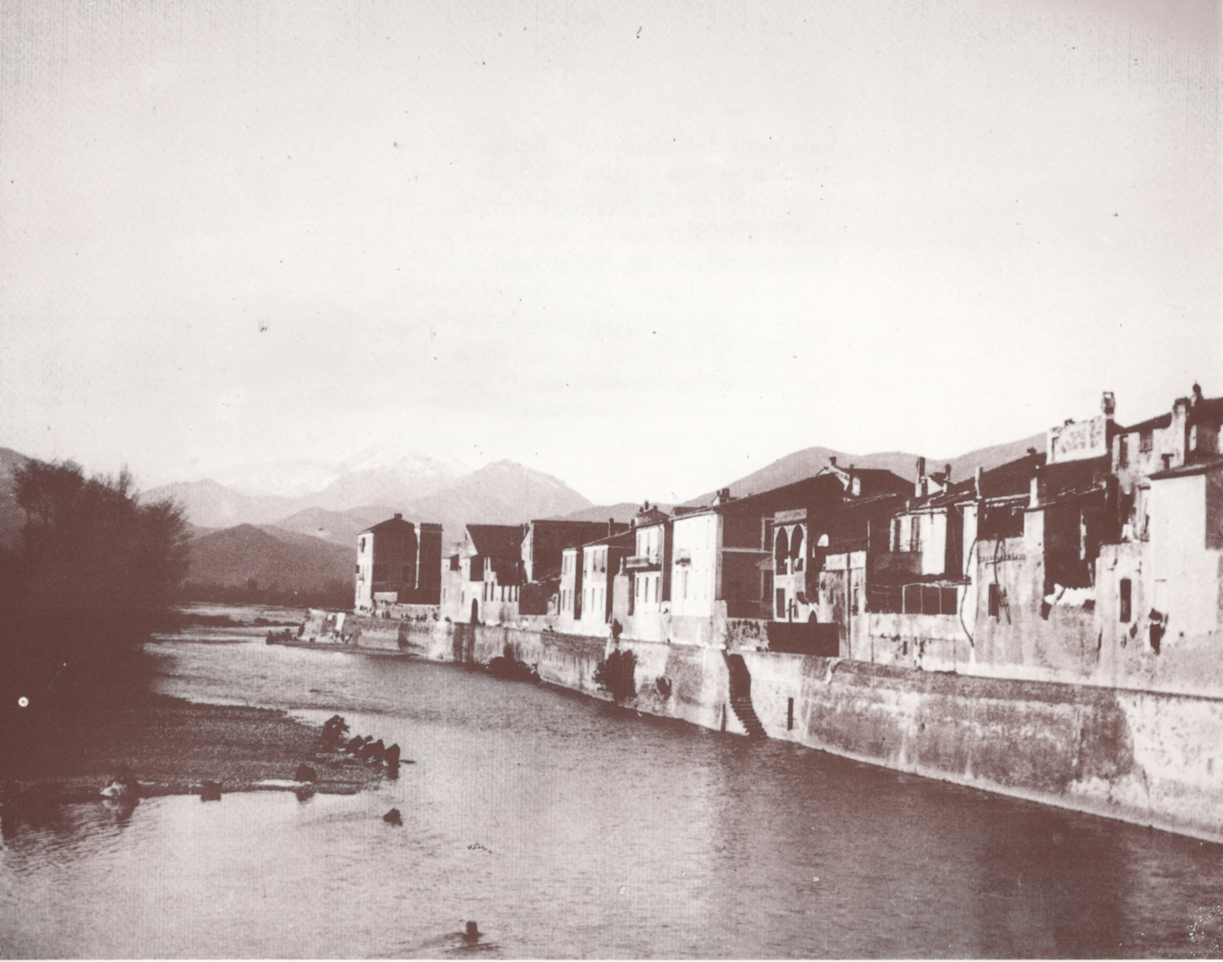 Immagine di inizio 900 del lungofiume di Albenga del tutto assente